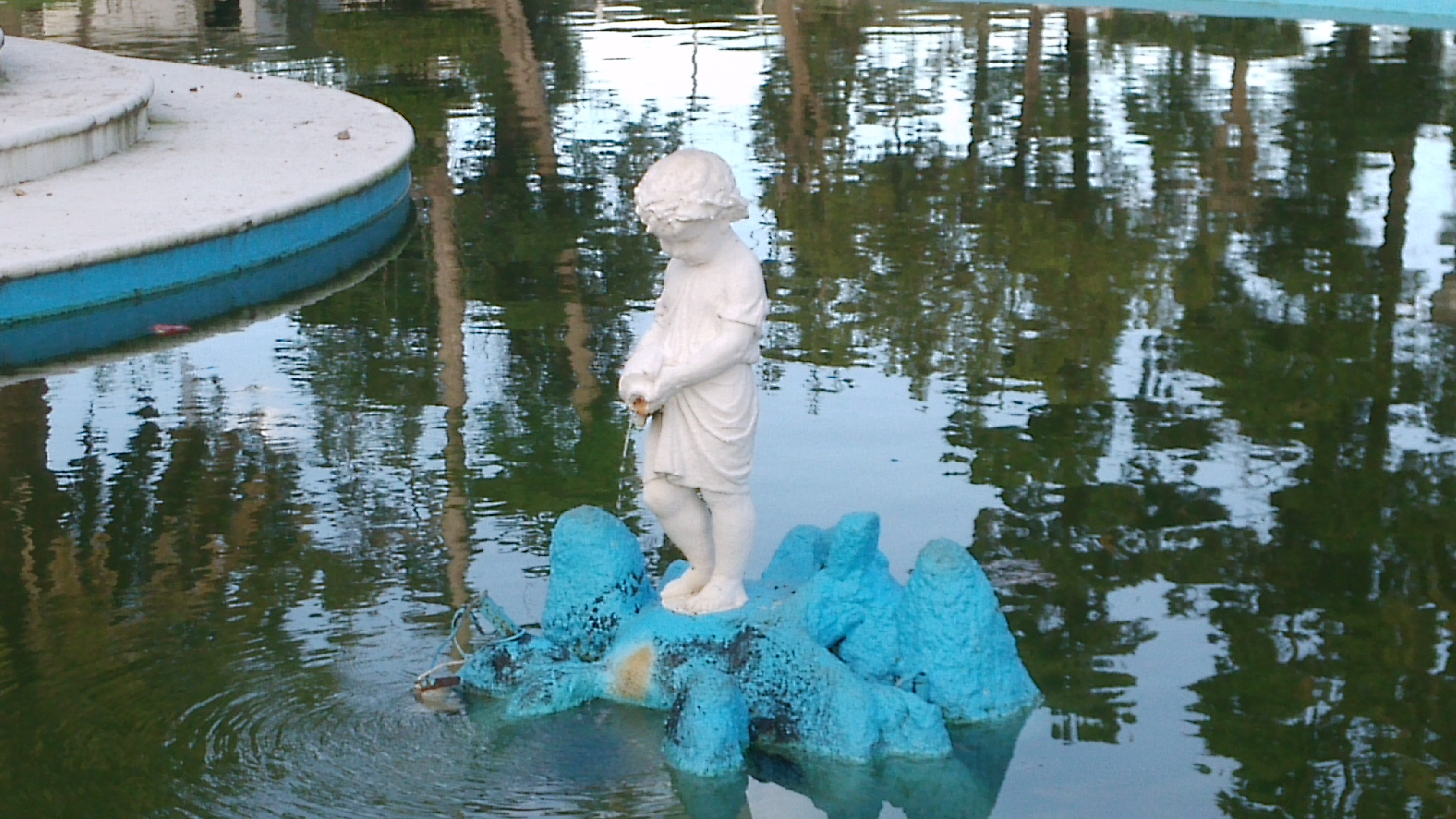 Escultura de un niño en la base de la Fuente de Venus en Piriápolis, Maldonado, Uruguay.